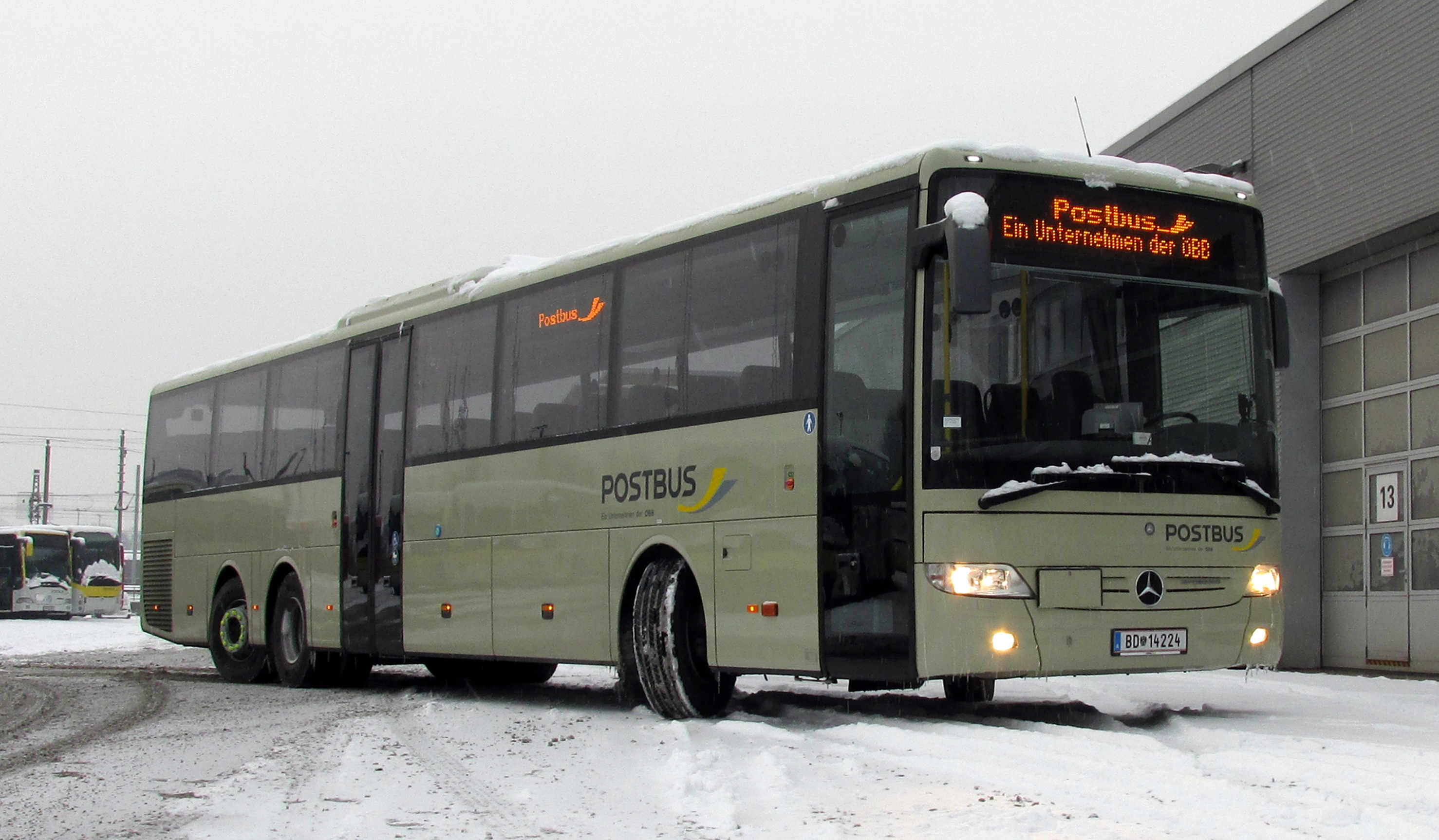 ÖBB Postbus Integro L in Linz